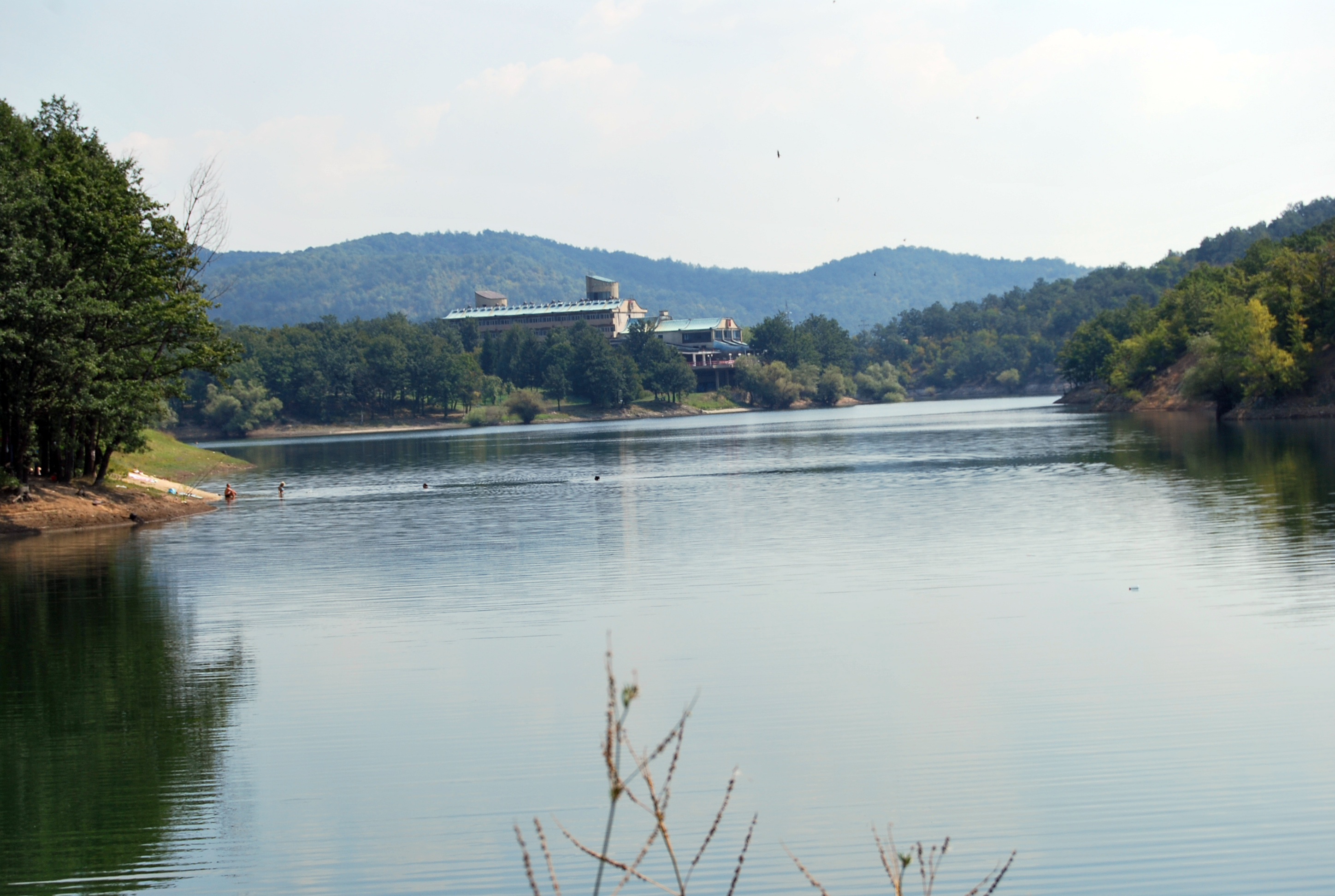 Борско језеро